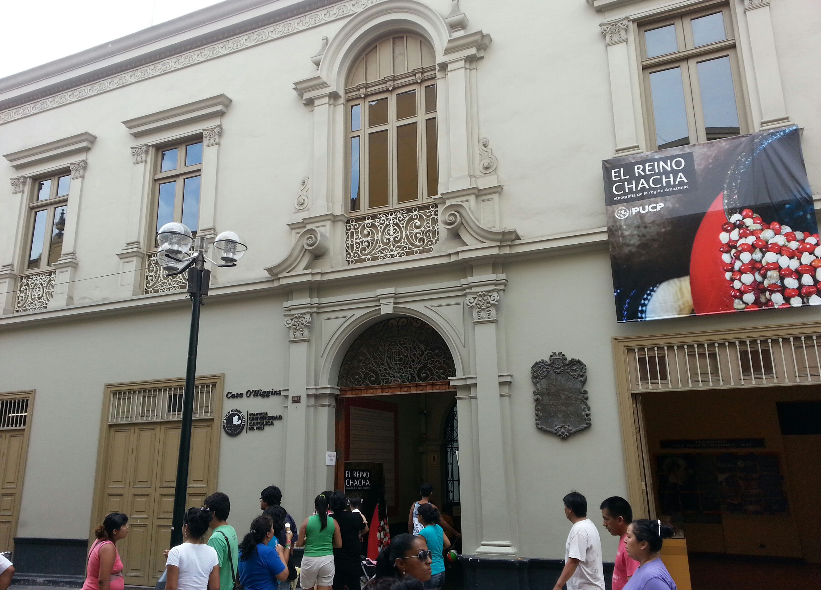 Casa O'Higgins en el Jirón de la Unión en Lima, Perú.